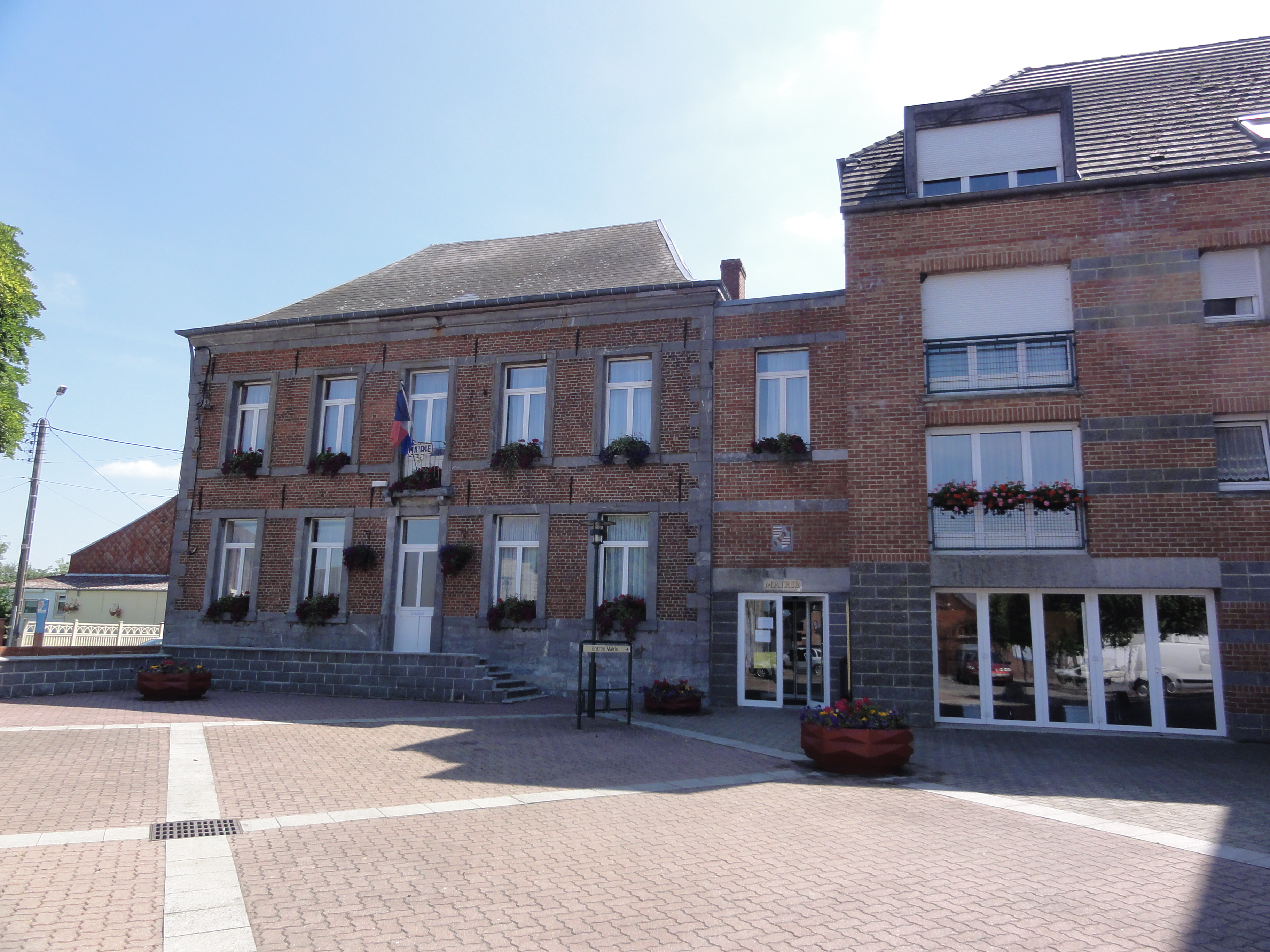 Avesnelles (Nord, Fr) mairie